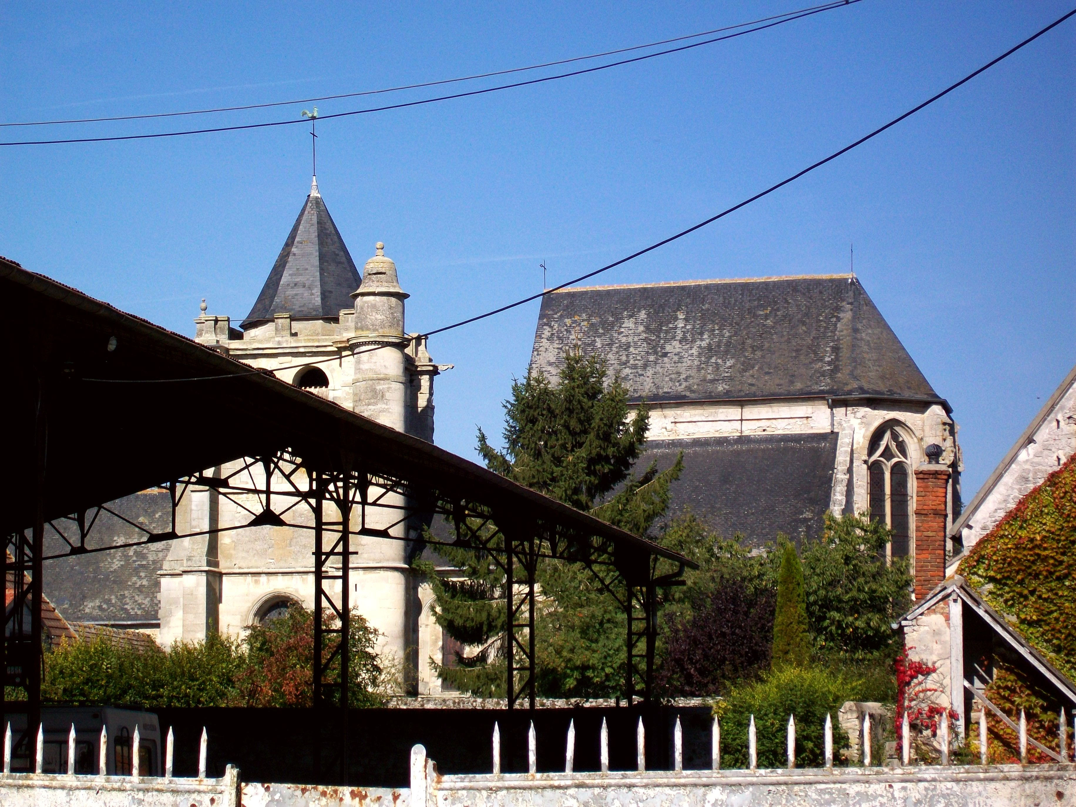 La même vue en 2010: le classement M.H. n'empêche pas cet hangar disgracieux de gâcher la perspective.